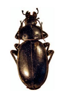 Carabus impressus